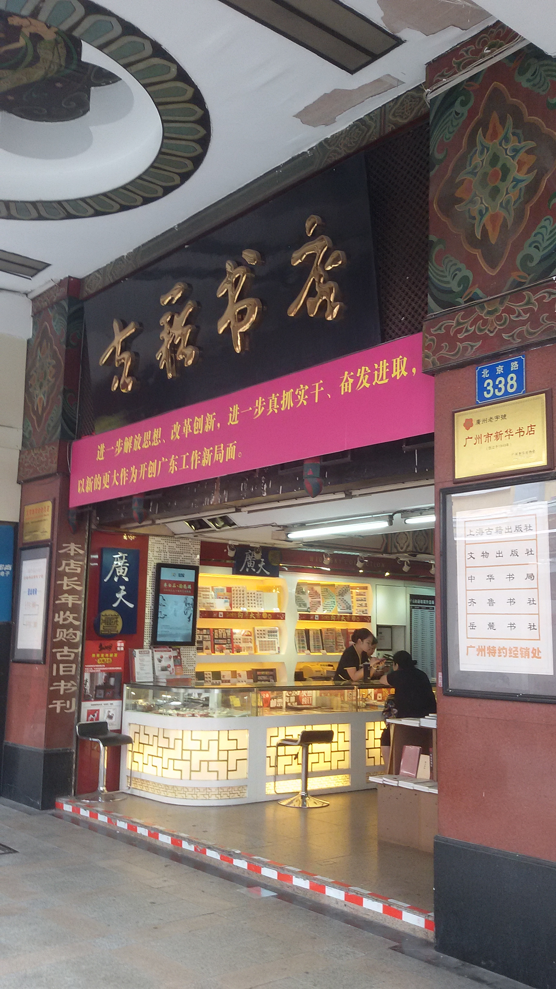 粵語: 廣州市古籍书店